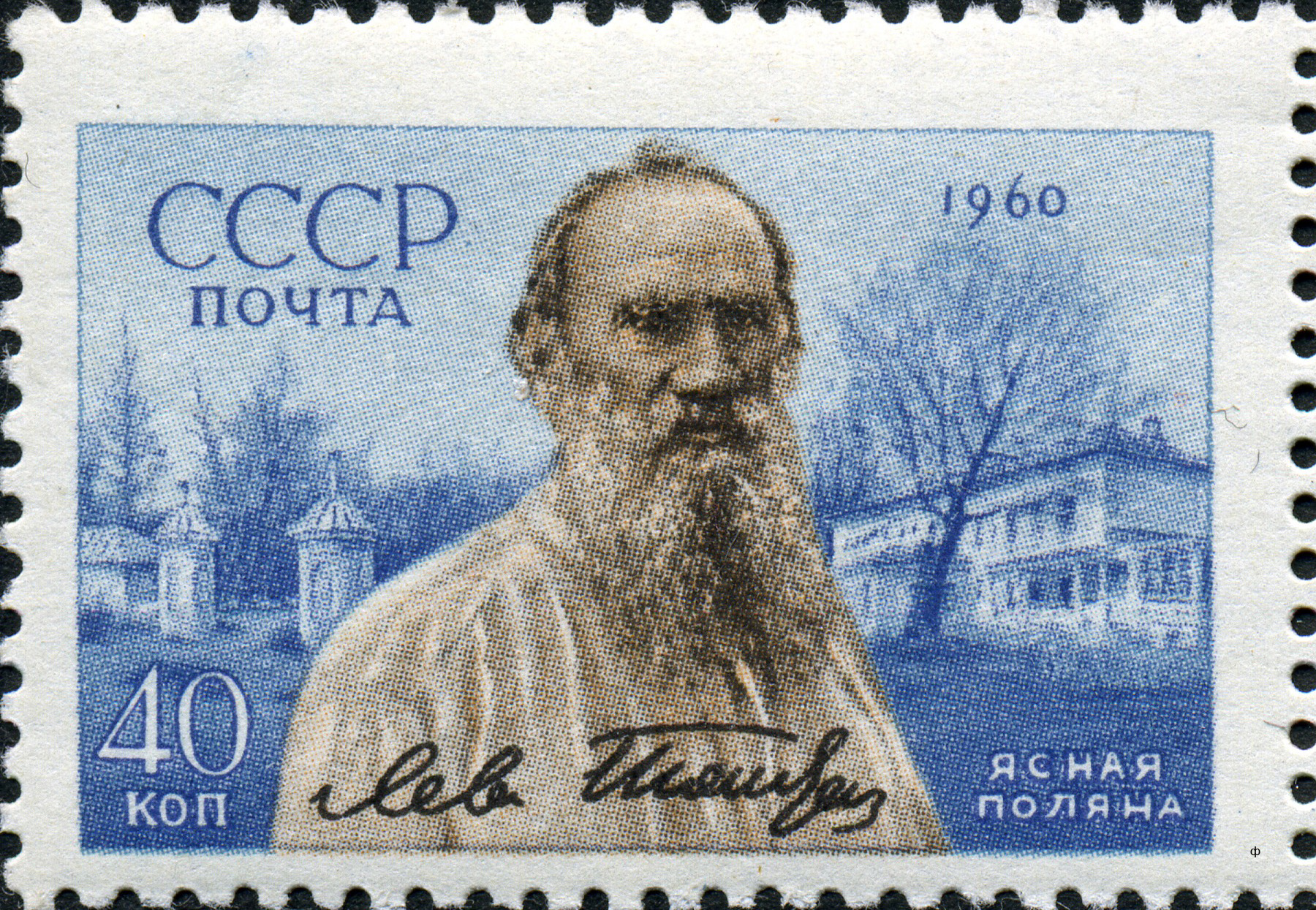 Марка СССР